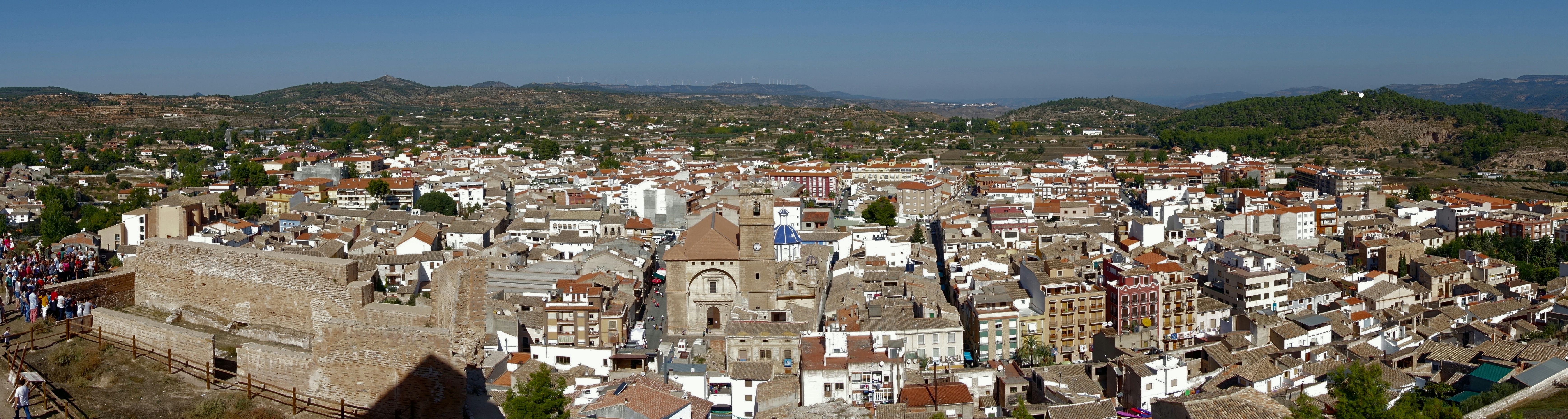 Vista panorámica de Ayora (Valencia, España) en 2017.